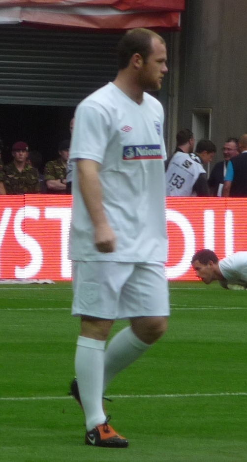 Wayne Rooney